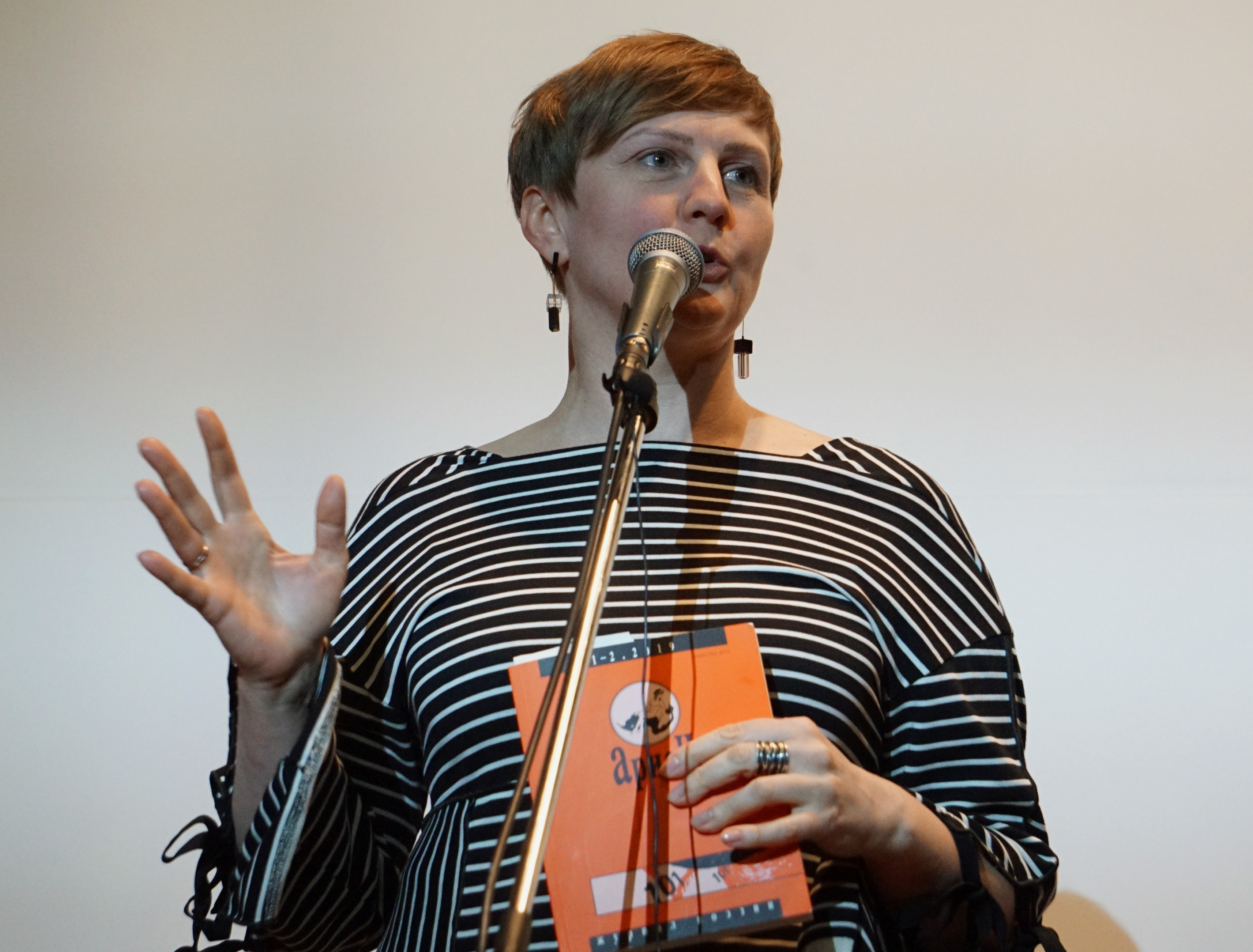 Ганна Шевченко — поэт, прозаик. Родилась в г. Енакиево Донецкой области, Украина. На фото: Ганна Шевченко на завершающем вечере журнала поэзии «Арион» в Доме русского зарубежья имени Александра Солженицына, 16 апреля 2019 года.